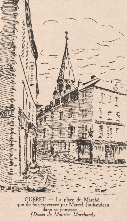 dessin de Maurice Marchand